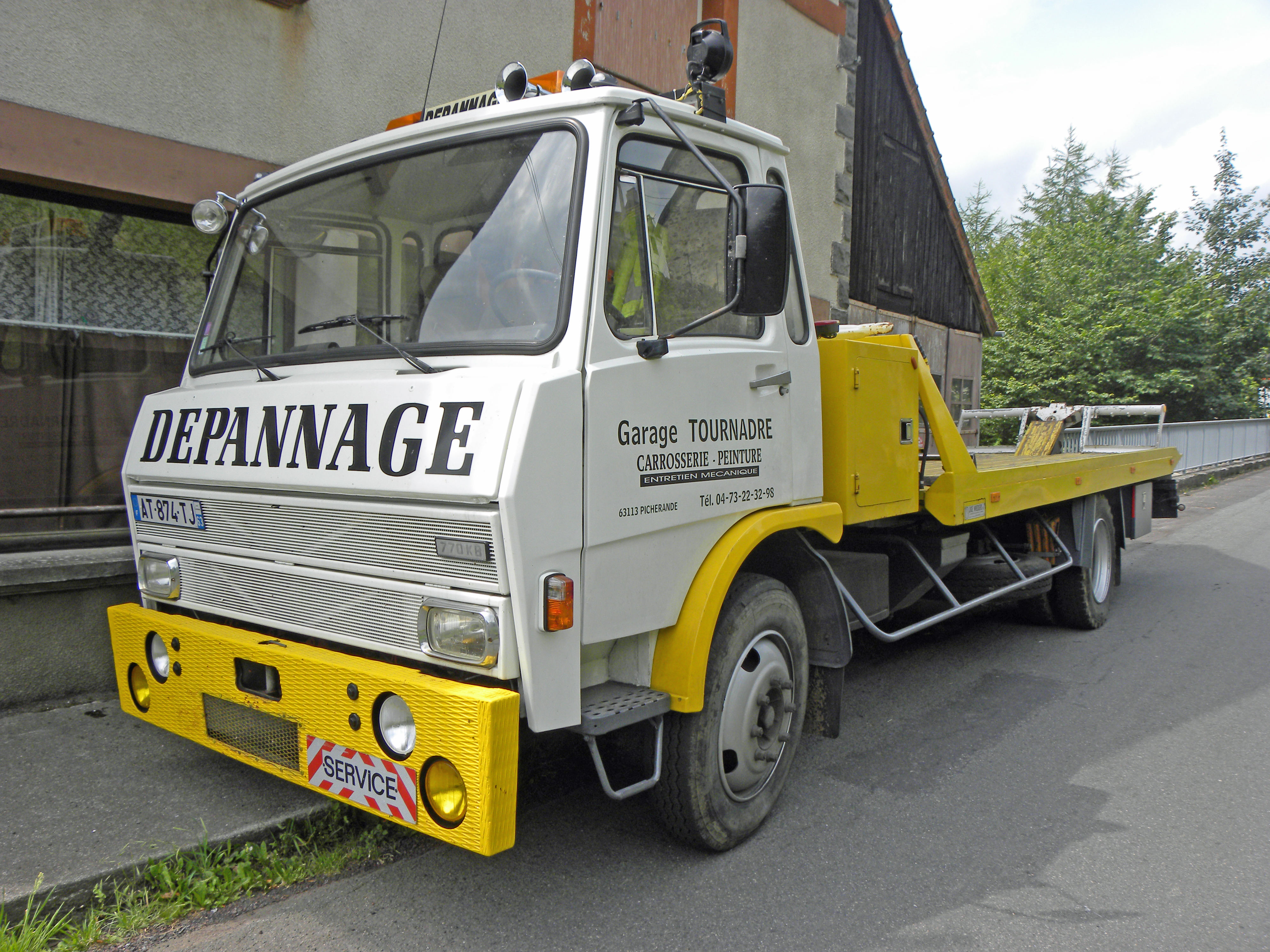 Berliet 770 KB